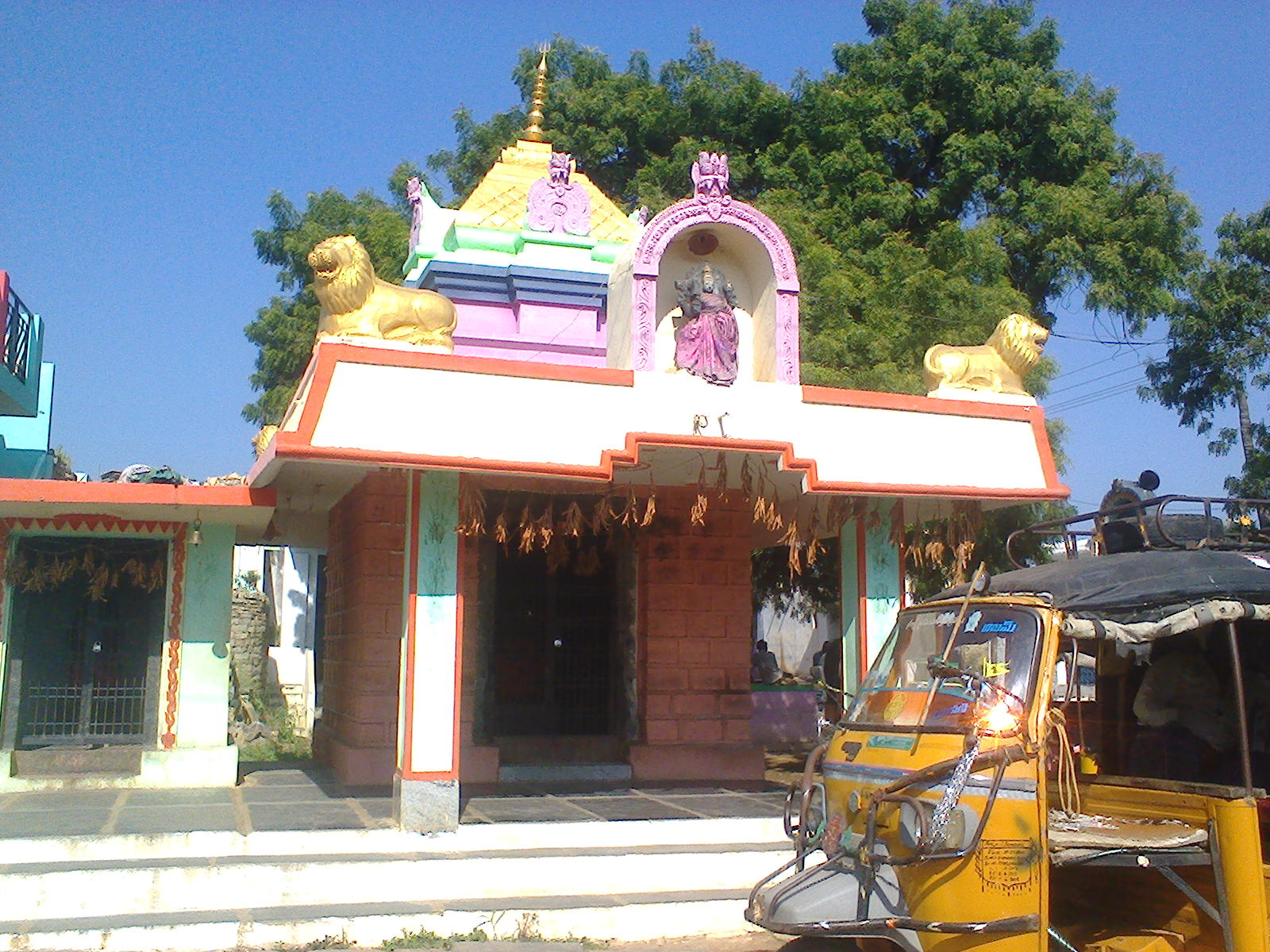 గ్రామంలో దేవాలయం